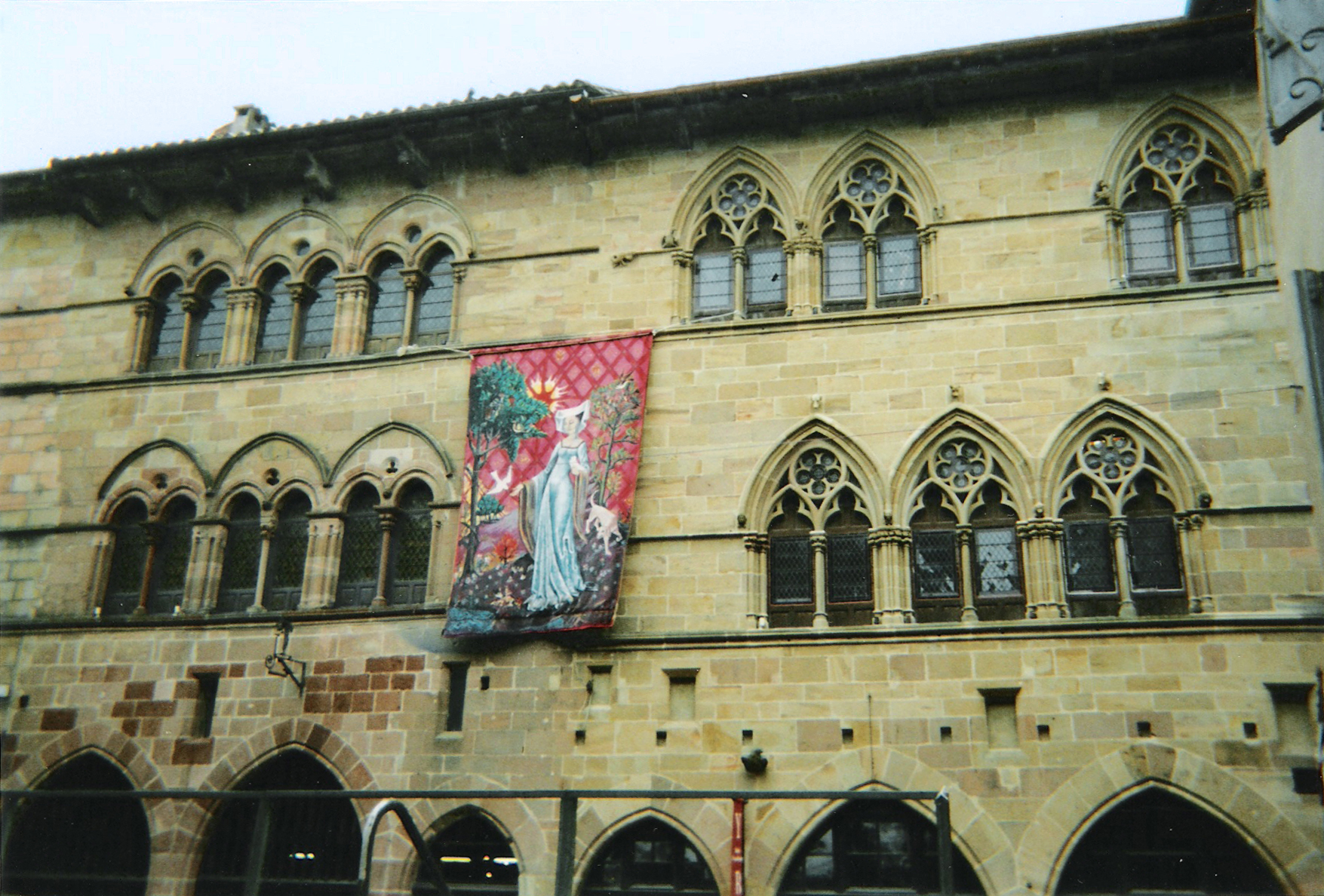 Façade d'un bâtiment médiéval ornée d'une tenture à Cordes-sur-Ciel (France, Tarn)